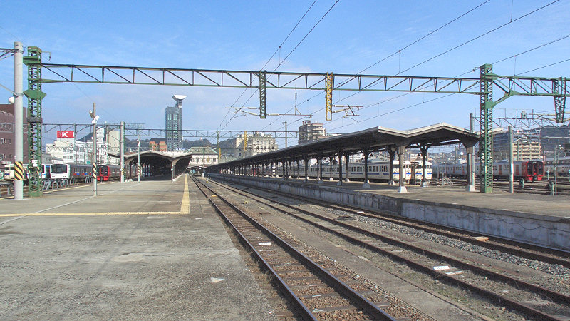 JRja:鹿児島本線ja:門司港駅 ホーム 写真奥が駅舎、写真手前が小倉駅方面。 撮影者/著者/著作権保有者 : MK Products (本人がアップロード) 撮影日 : 2007/01/19 門司港駅用にアップロードした画像です。良い画像があれば別の画像に変えてください。